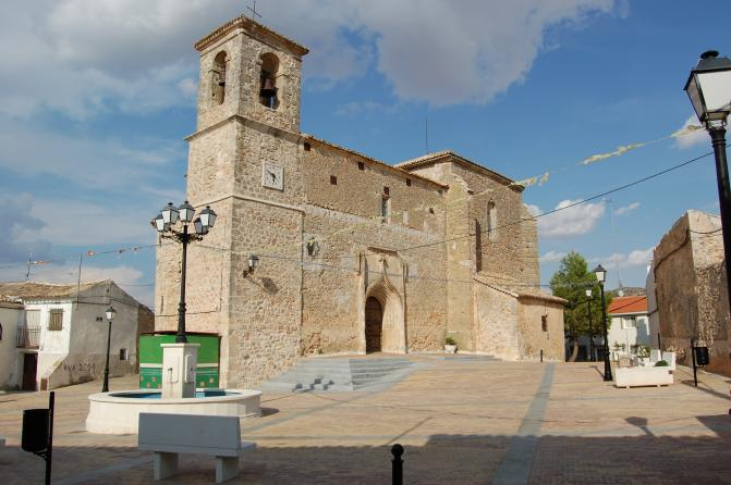 monumentos de saceda